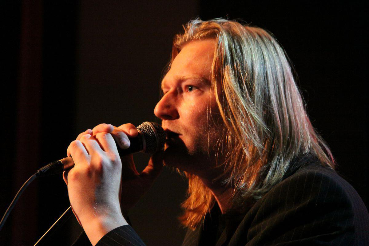 Christian Haase , singer / songwriter / bandleader from East Germany